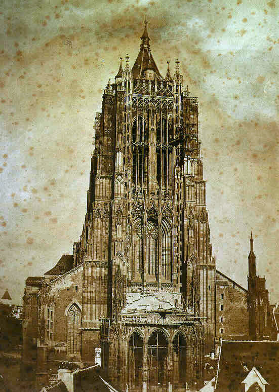 Das Ulmer Münster, um 1854. Älteste Ulmer Architekturaufnahme. Geschenk des Ulmer Fotografen Jakob Friedrich Radl an den Verein für Kunst und Altertum in Ulm un Oberschwaben 1855